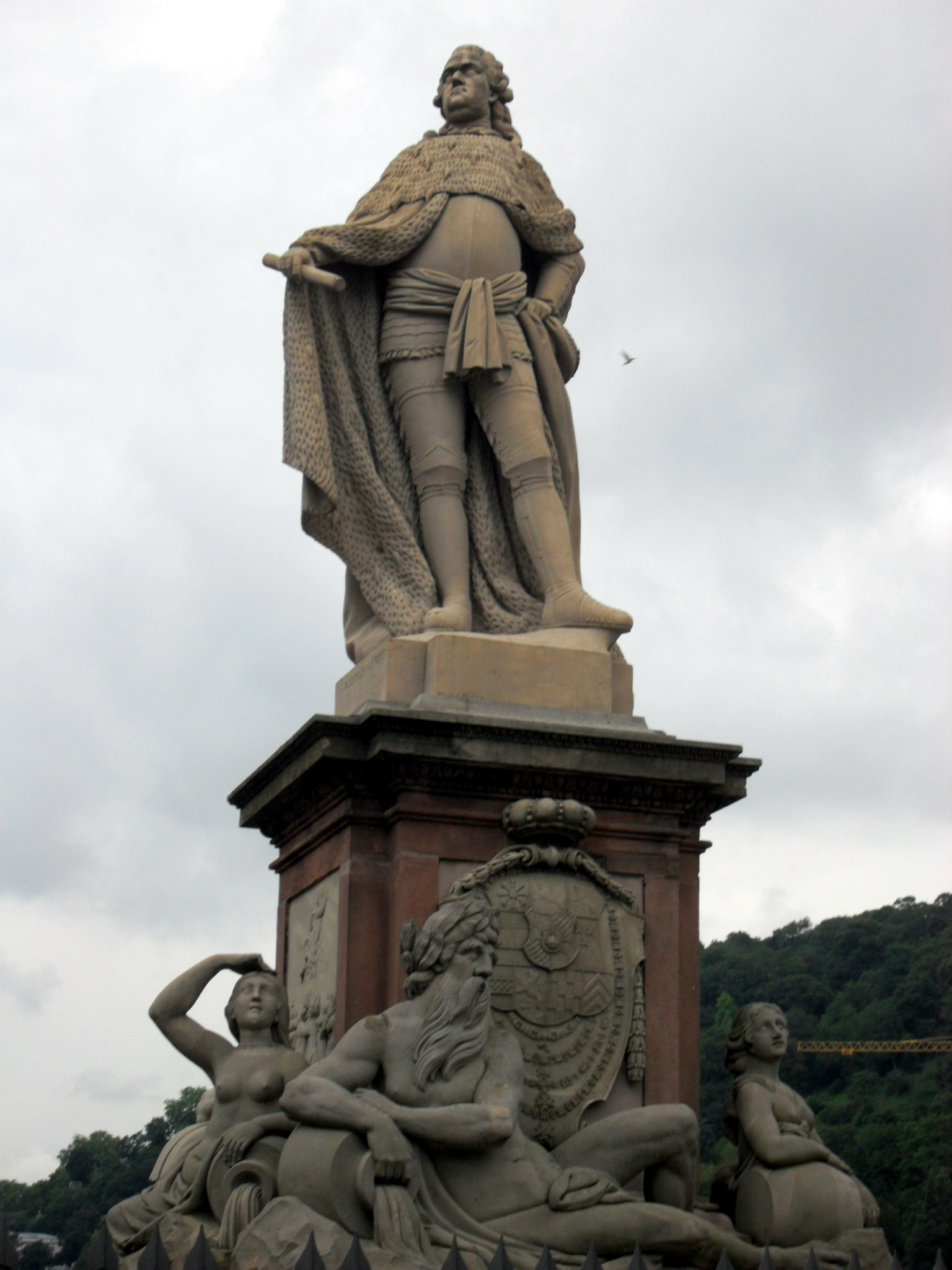 Памятник Курфюрсту стоит на мосту ближе к южному берегу Неккара